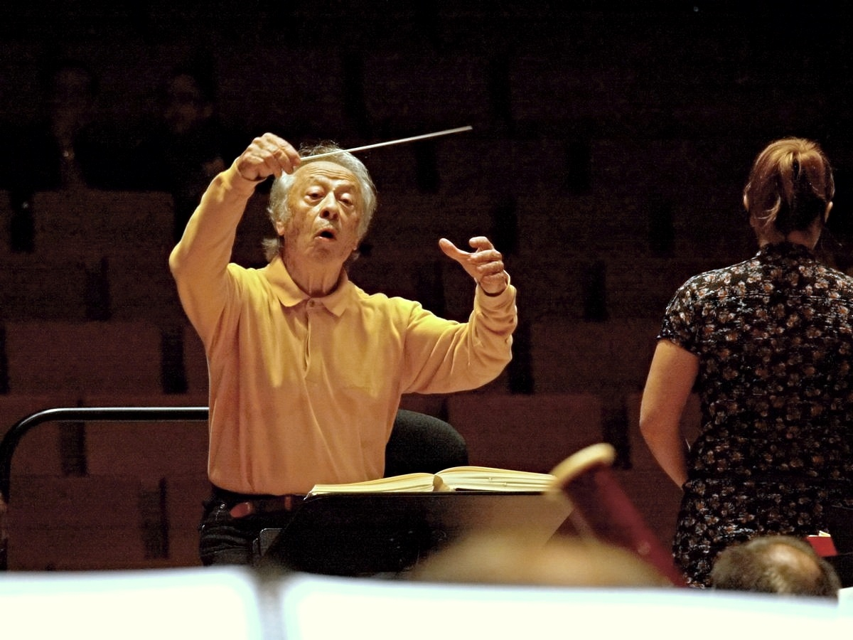 Alberto Zedda při nastudování opery Vilém Tell G. Rossiniho, Valladolid 2010